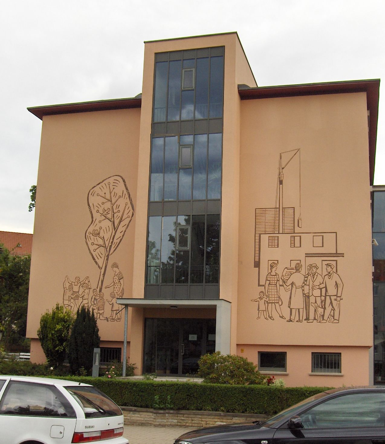 Fassadengestaltung Verwaltungsbebäude Groß AWG Aufbau Dresden, Dresden-Striesen, Henzestraße 14